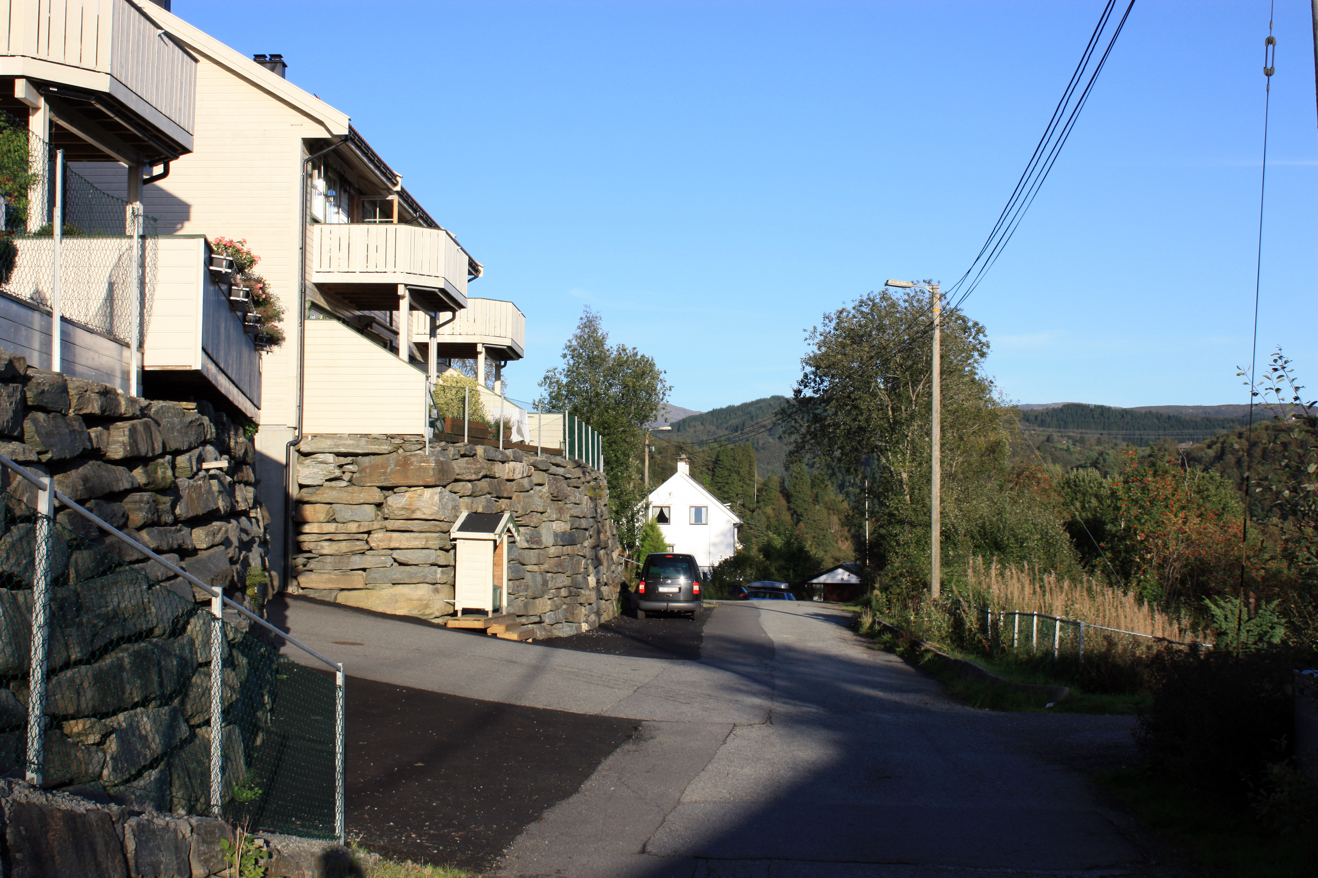 Midtlia, Fana, Bergen.